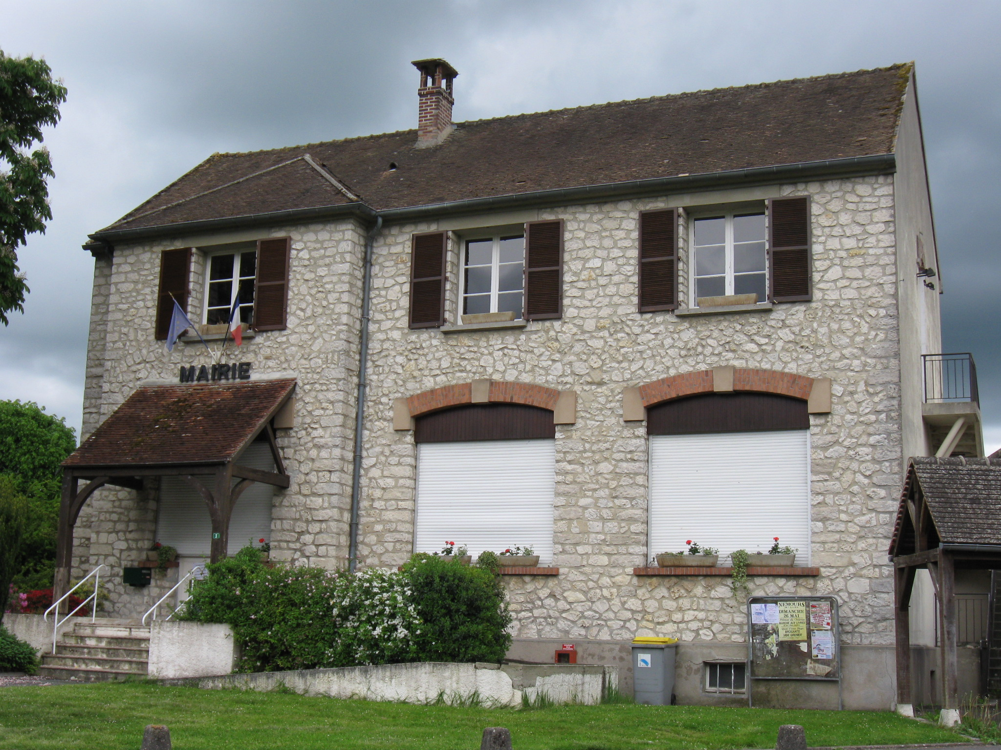 Mairie de La Genevraye. (département de la Seine et Marne, région Île-de-France).